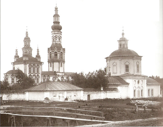 Покровский монастырь в Верхотурье. Походяшинская церковь